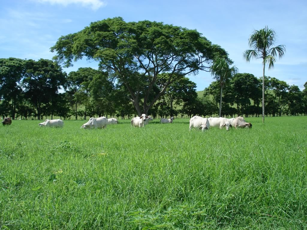 Ganaderia en el departamento de Cordoba, Colombia.